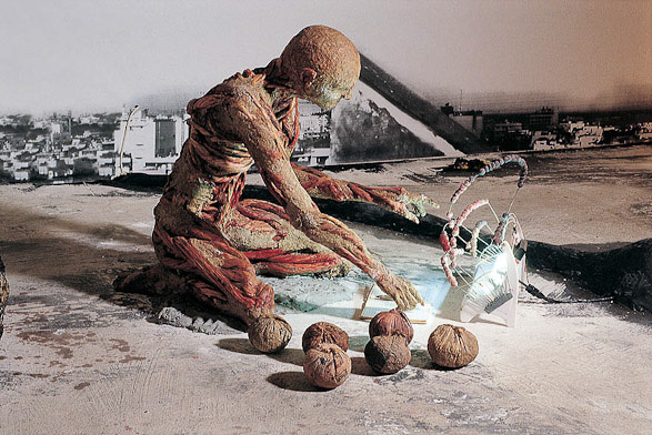 installation